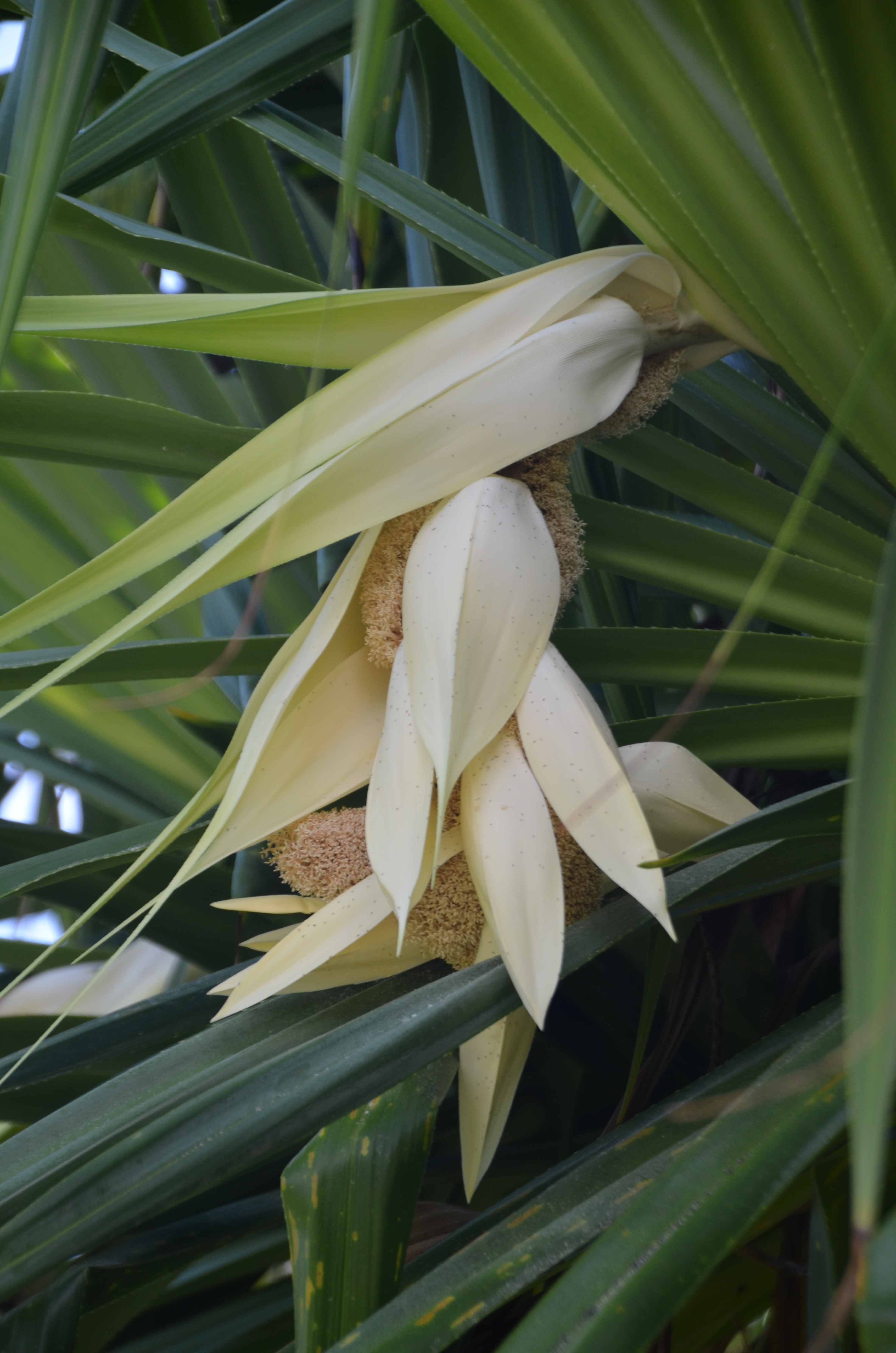 Hīnano